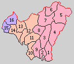 山口県厚狭郡の町村制時点の町村。